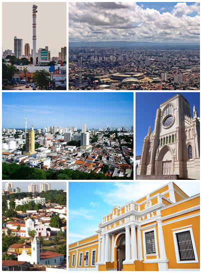 Montagem do município de Cuiabá, Brasil.